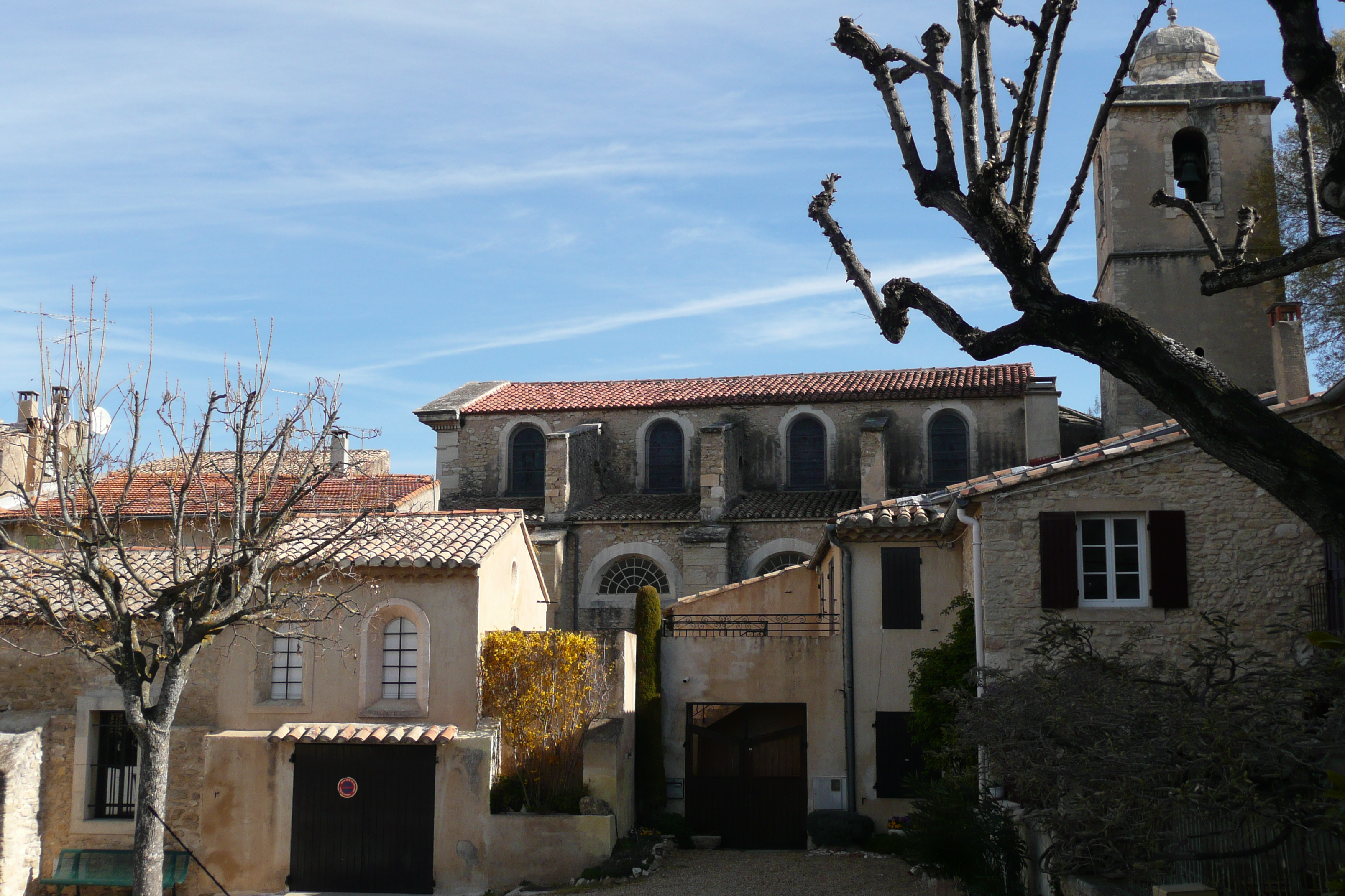 Eglise à Lagnes.